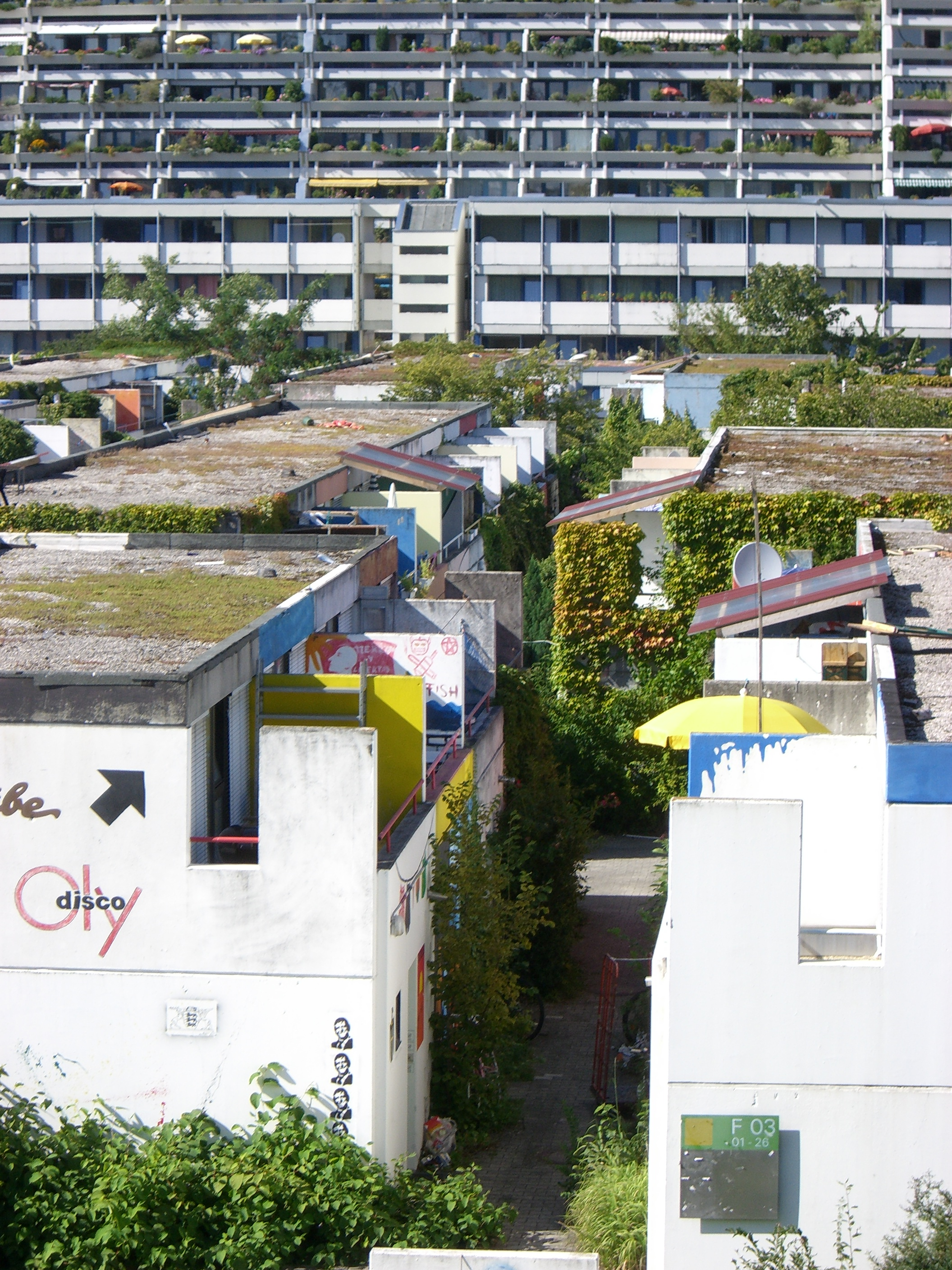 München - Olympisches Dorf (Bungalowreihe).jpg